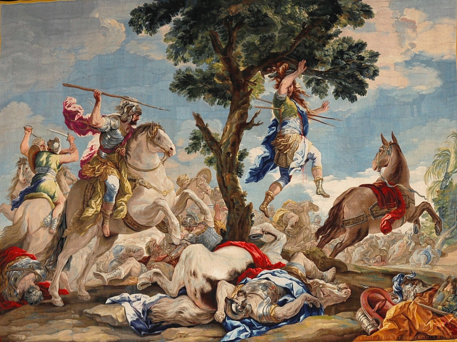 Tapiz titulado Muerte de Absalón cedido en depósito por el Patrimonio Nacional al CESEDEN mediante acta de entrega de fecha 18 de abril de 1956. El paño fue tejido en 1817 en la Real Fábrica de Tapices de Madrid, bajo la orientación de su director don Livinio Stuyck y Vandergoten, tomando como modelo el tejido en el siglo XVIII para el comedor del rey Carlos III en el Palacio Real. El cartón, conservado en el Palacio de Aranjuez es obra del pintor de cámara Corrado Giaquinto durante su estancia en Madrid entre 1753 y 1762, que realizó su composición sobre los textos bíblicos del libro de Samuel.